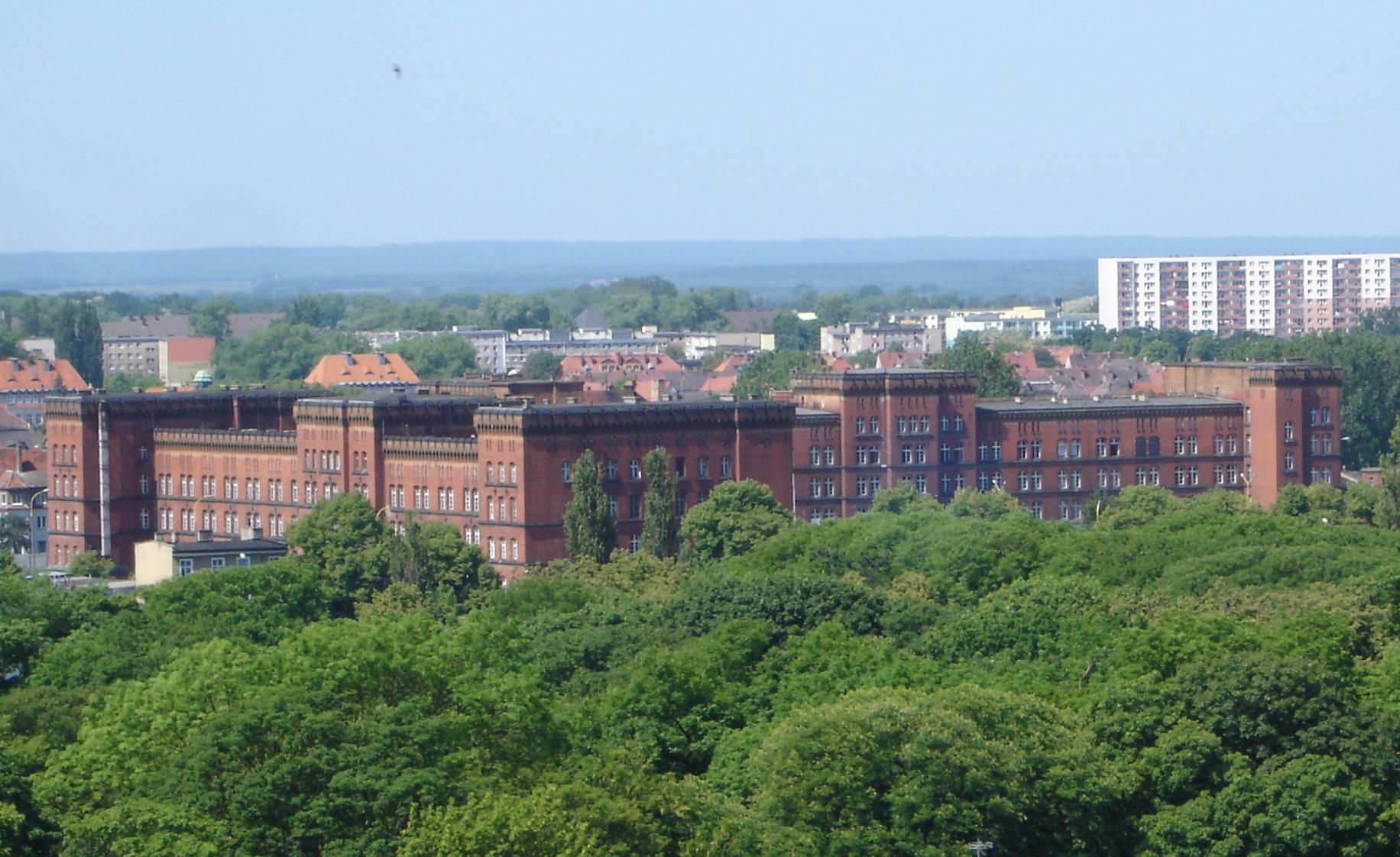 Czerwone Koszaty in Stargard Szczeciński